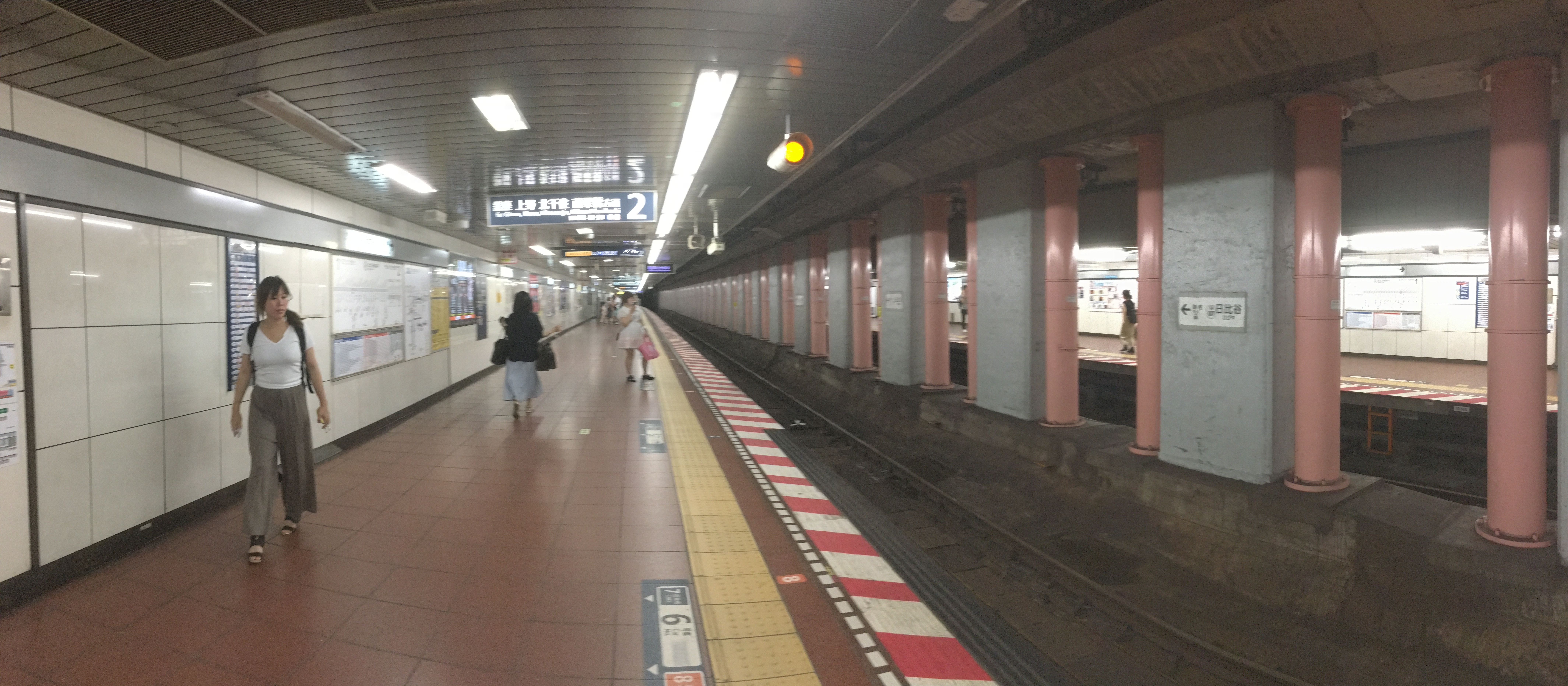 日比谷線、日比谷駅のホーム (Hibiya Line, Hibiya Station platform)